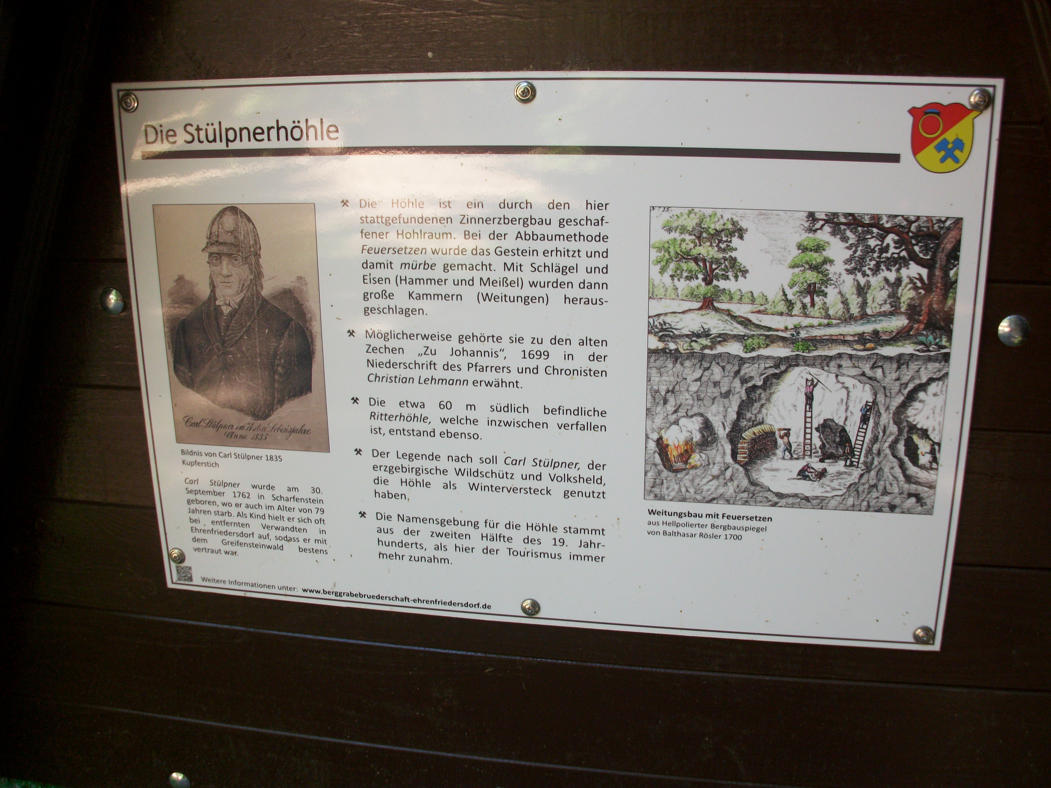 Bergbaulehrpfad Silberstraße, Station 18 Stülpnerhöhle bei den Greifensteinen